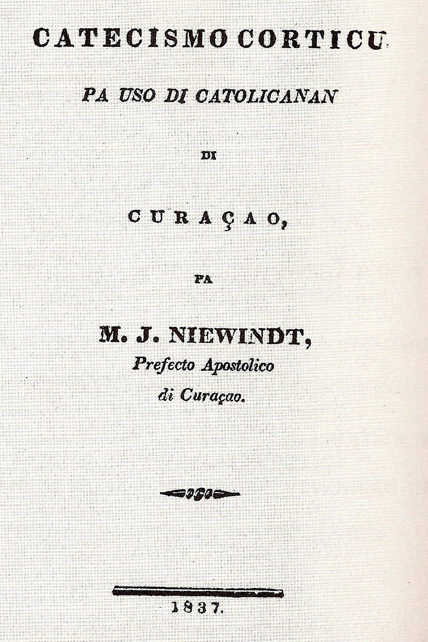 Titelpagina van het oudst bewaard gebleven drukwerk in het Papiaments (1837). Eigen scan voor publiek domein.